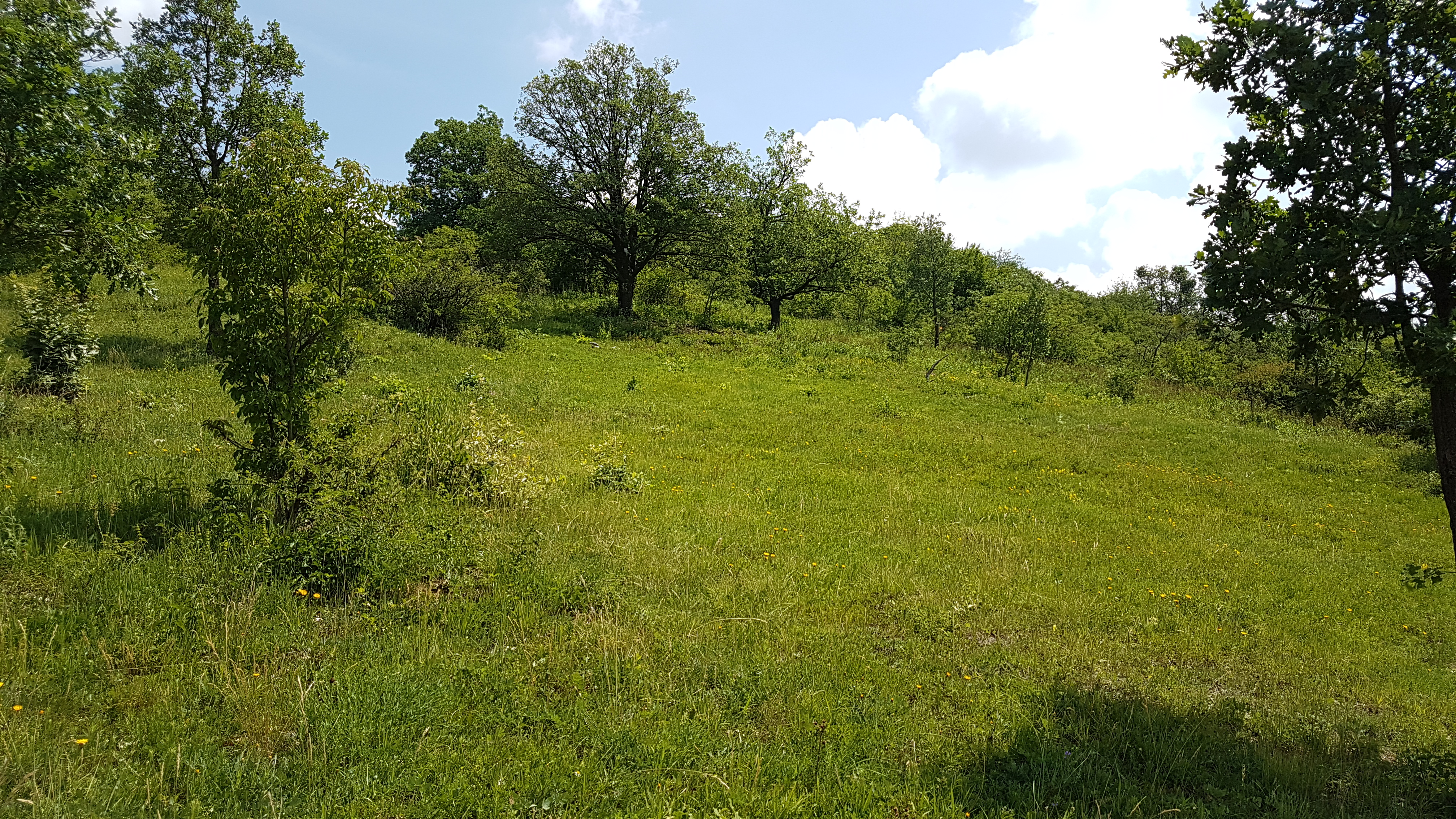 Louka na Kavkách